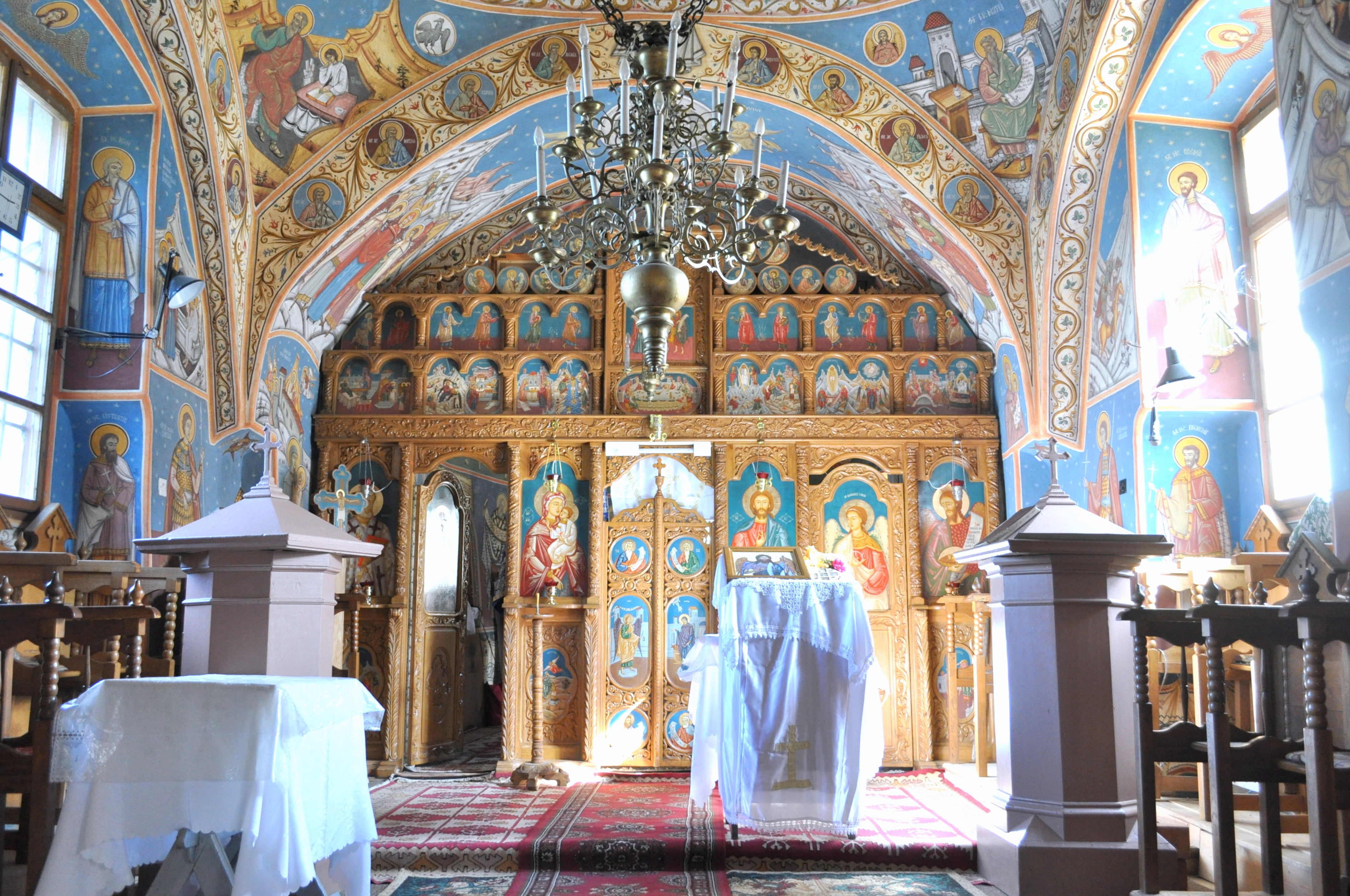 Biserica "Naşterea Sf. Ioan Botezătorul"-Din Grui